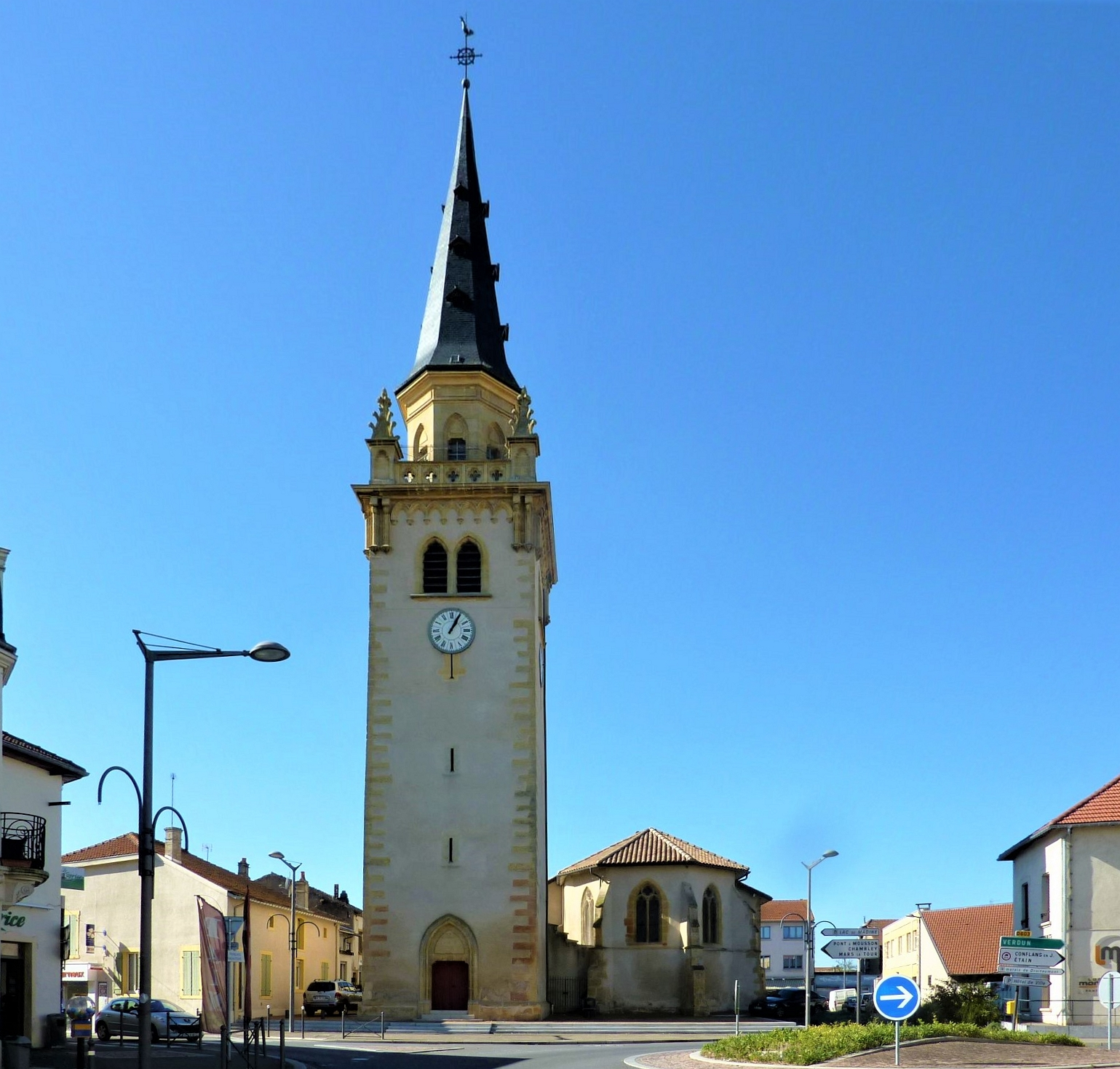 Église Saint-Maximin de Jarny